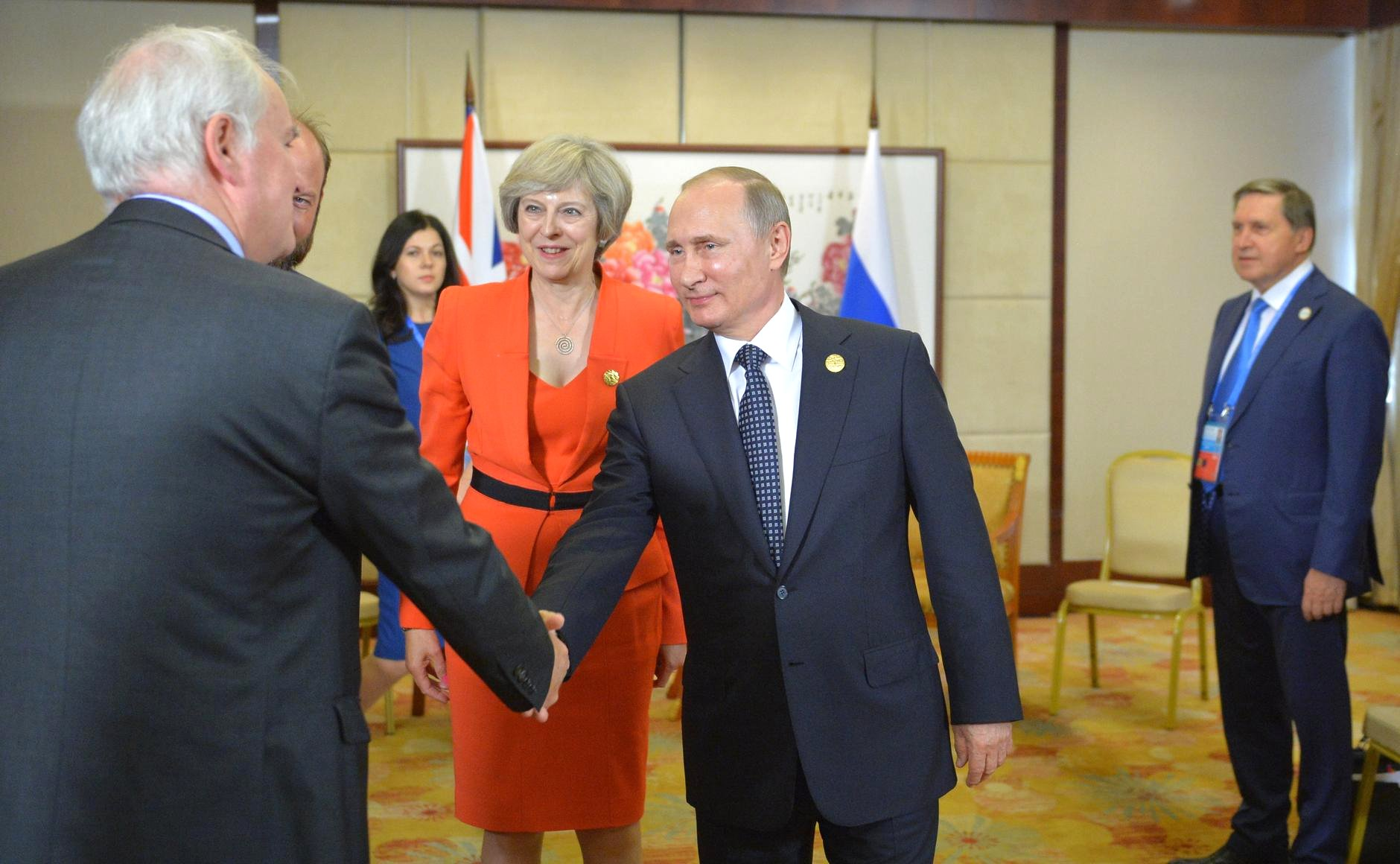 Перед началом встречи Президента России Владимира Путина с Премьер-министром Великобритании Терезой Мэй